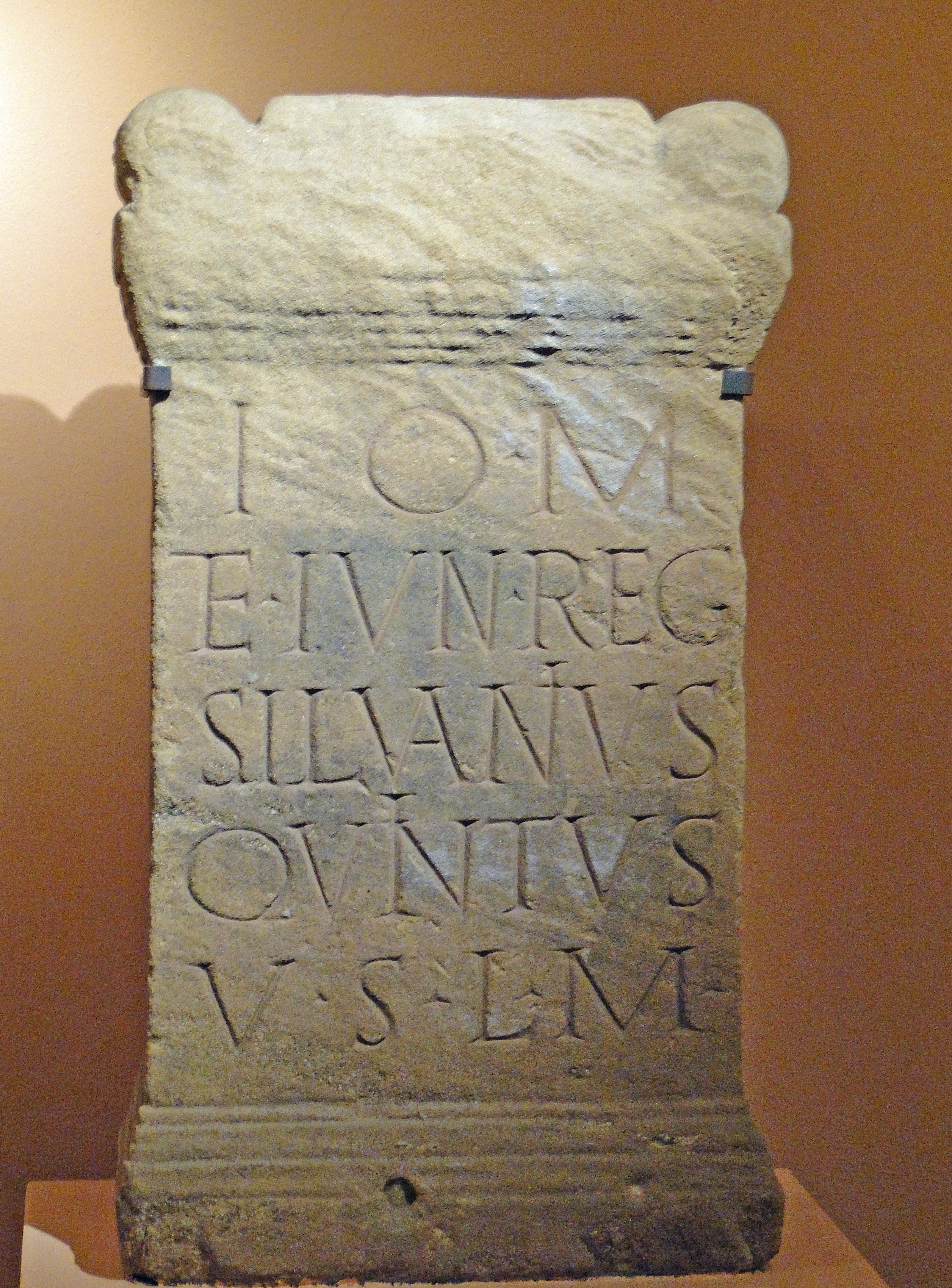 Weihealtaltar zu Ehren von Jupiter und Juno, 2.-3. Jh.n.Chr., Burg Eisenberg (Pfalz), im Donnersbergkreis.